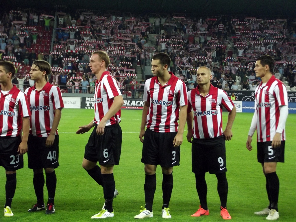 Zdjęcie zrobione podczas meczu pomiędzy Cracovią a Stomilem Olsztyn w Krakowie.